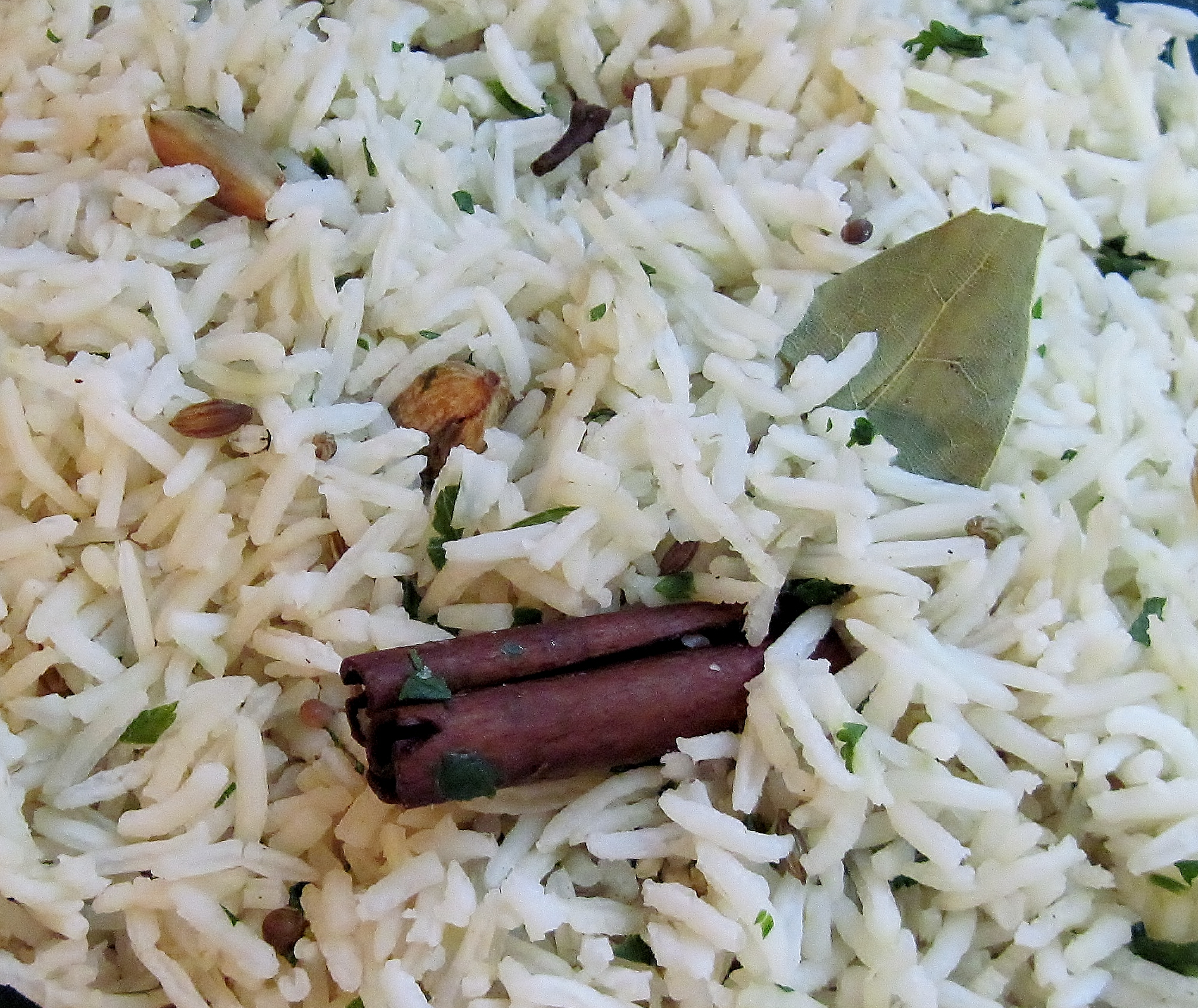 India Basmati Rice, Arroz